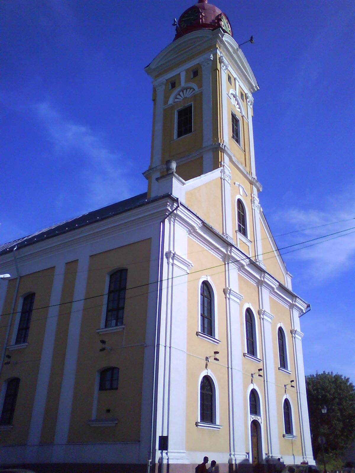 Biserica Reformata de pe Podul Viilor - Baia Mare